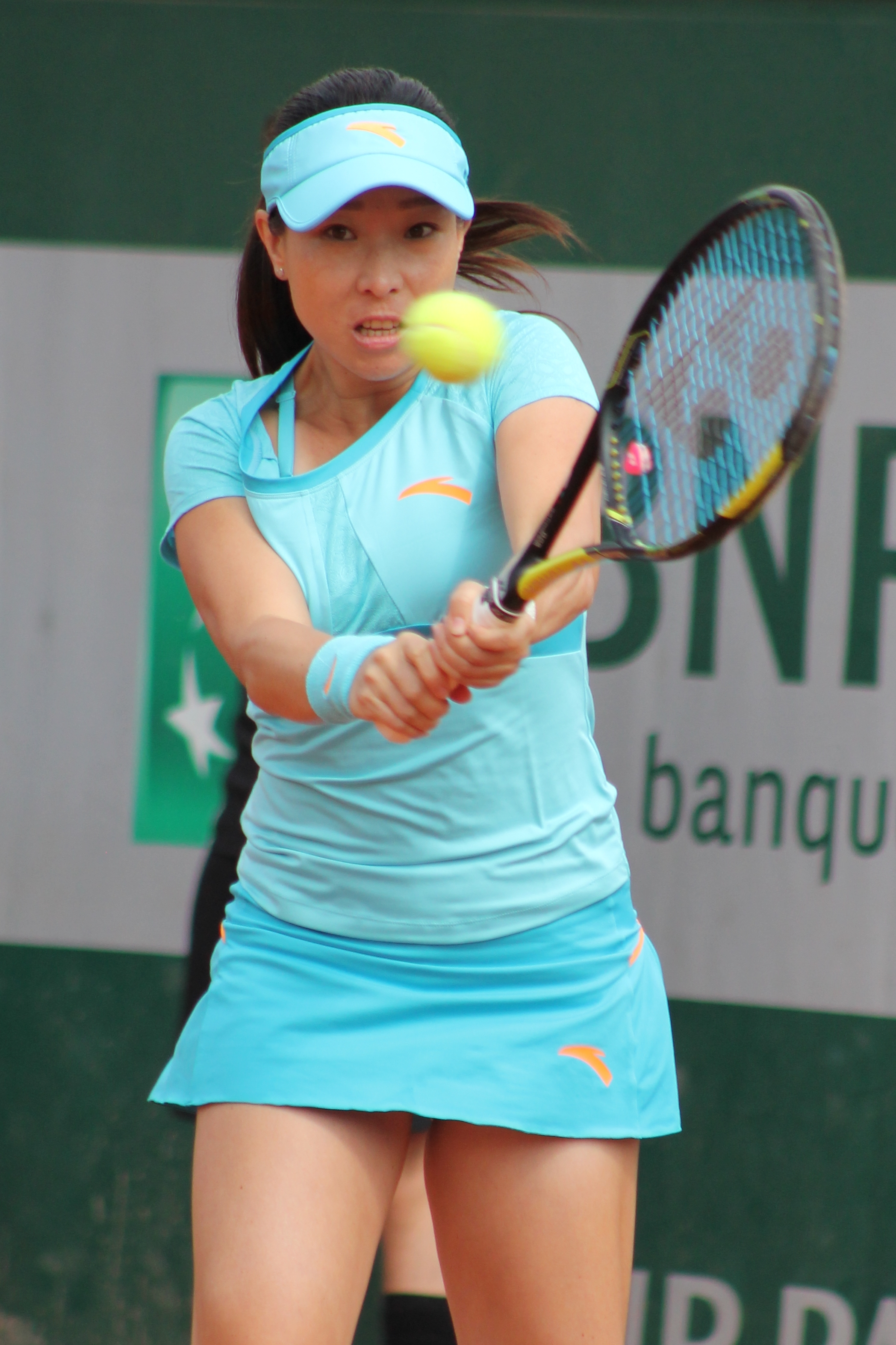 Zheng J. RG15 (5)